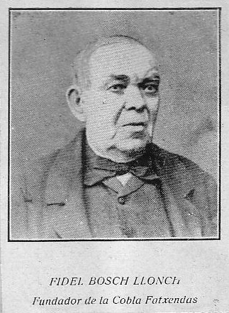 Foto retrato de Fidel Bosch Llonch, músico y fundador de la orquesta Els Fatxendes